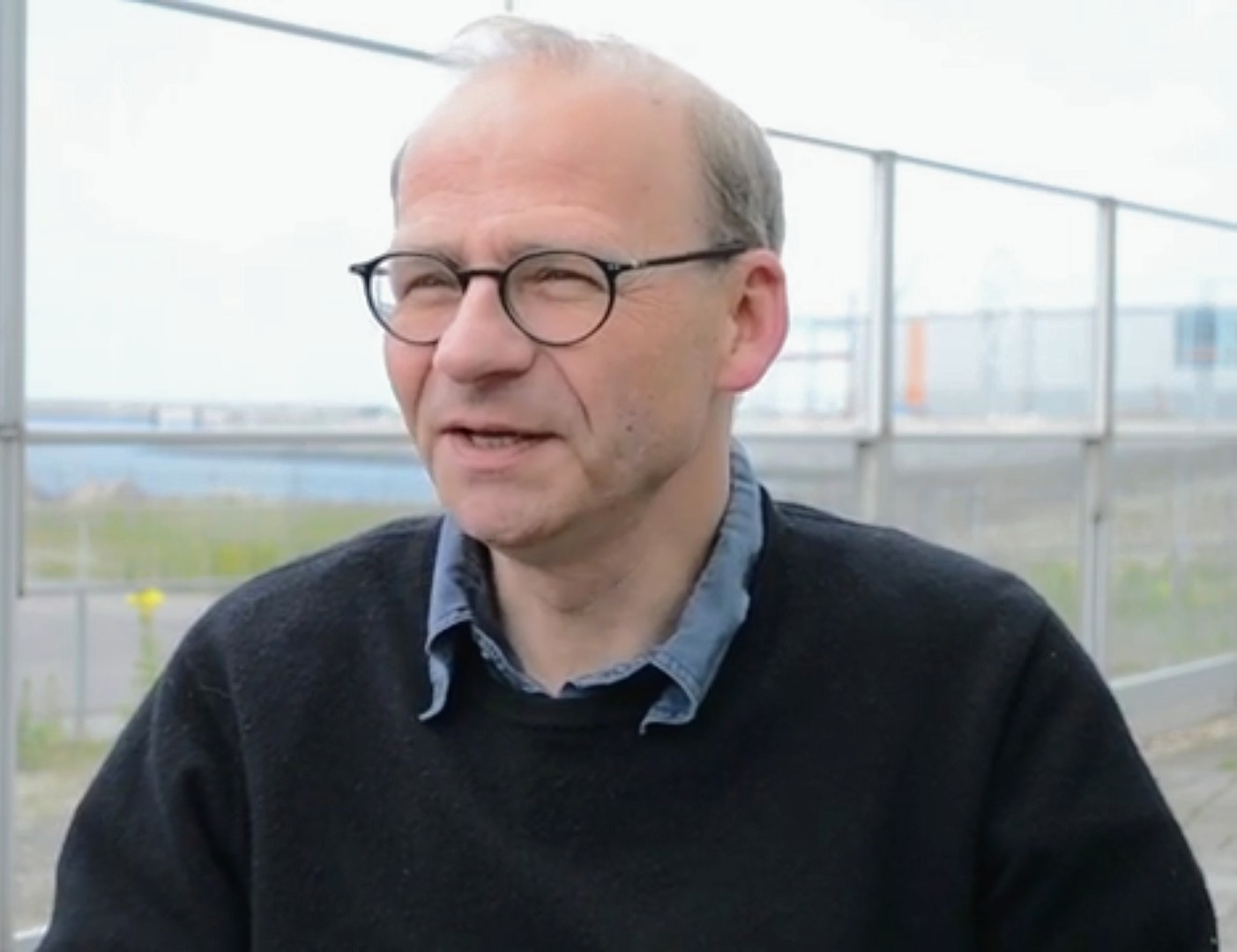 Auf umgekehrten Güterwegen Berlin – Duisburg – Rotterdam: Tagebuch einer Vernetzungsreise zu den Arbeitsbedingungen in Häfen 21. bis 26. Juni 2016 Interviews mit Teilnehmer*innen Video: María José Román